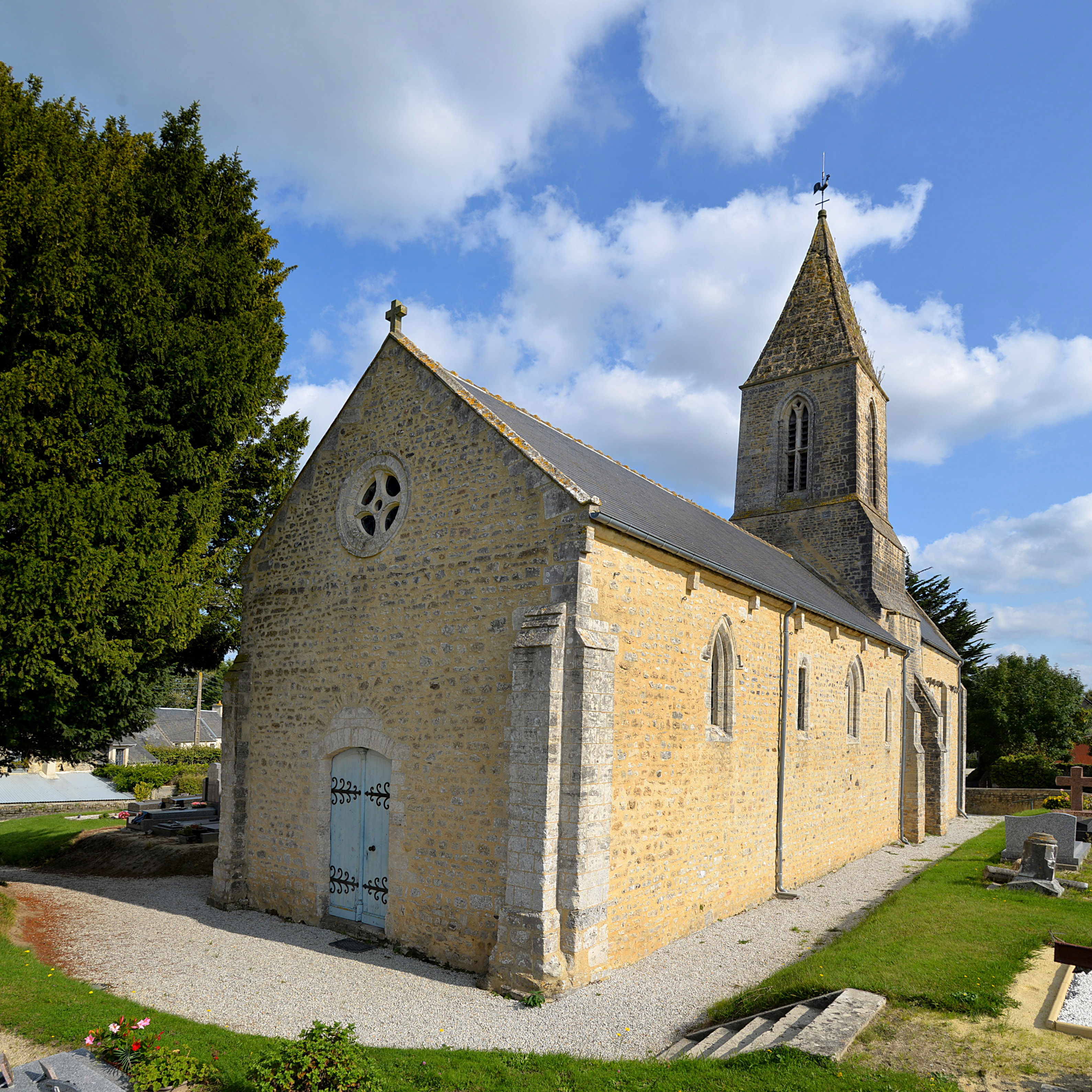 Manvieux (Calvados)